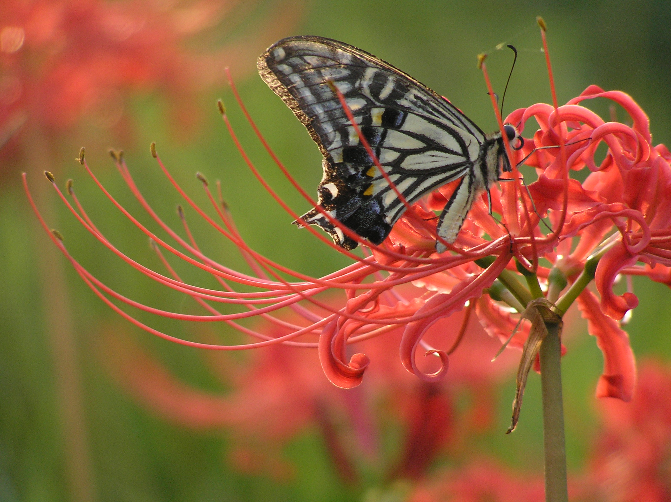 彼岸花と蝶 ～photo by Autumn Snake おぉたむすねィく探検隊